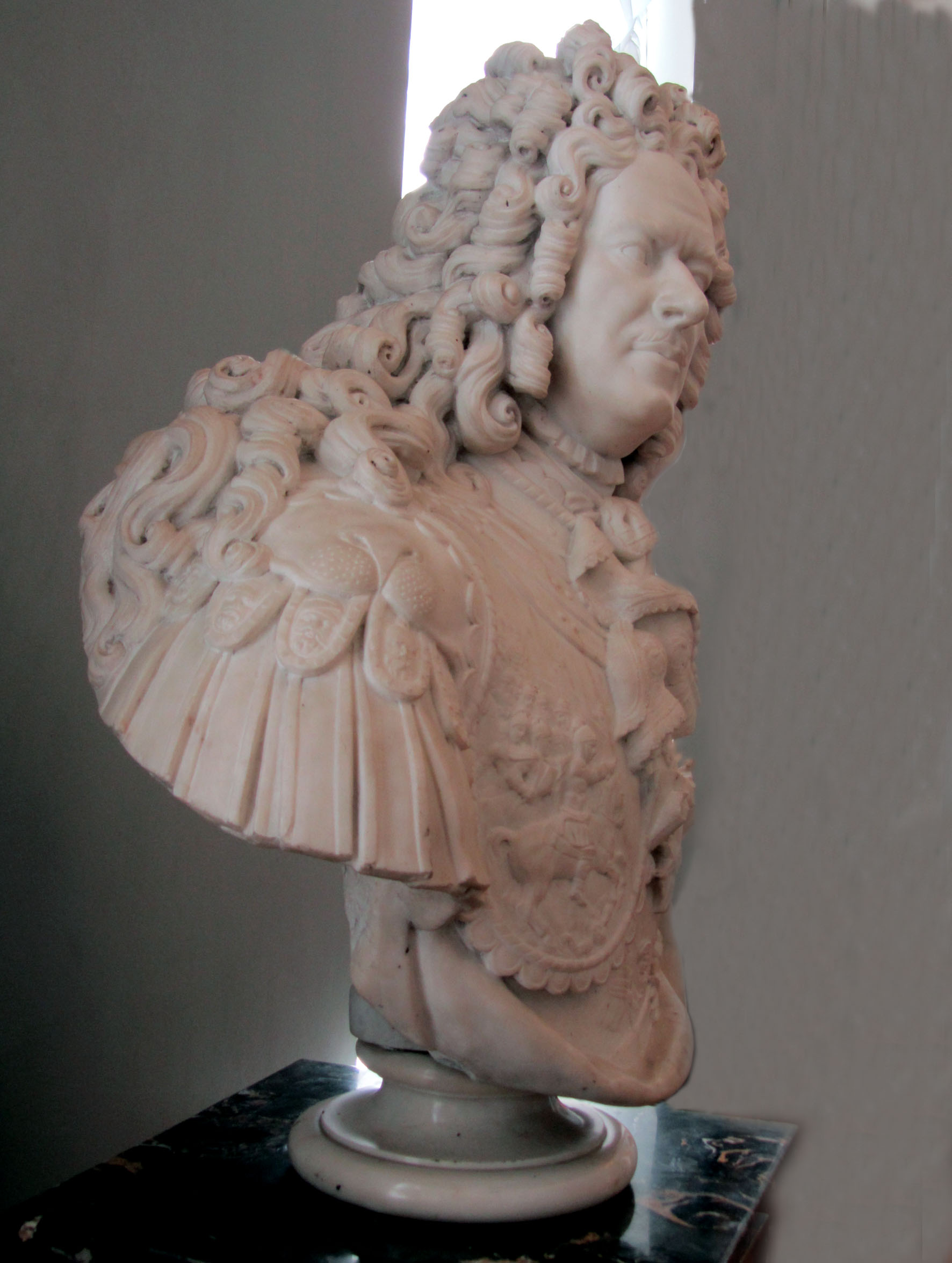 Palacio Mikhailovsky (Museo Ruso) San Petersburgo. Rusia. Retrato de Alexander Menshikov (1849) original de Carlo Rastrelli